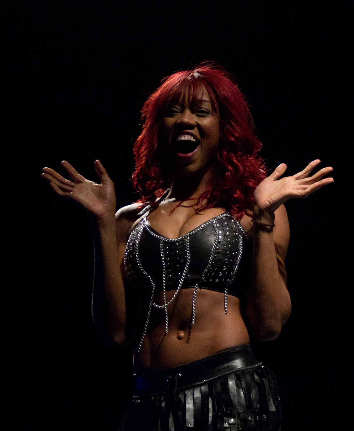 Alicia Fox lors d'un House Show en 2011.